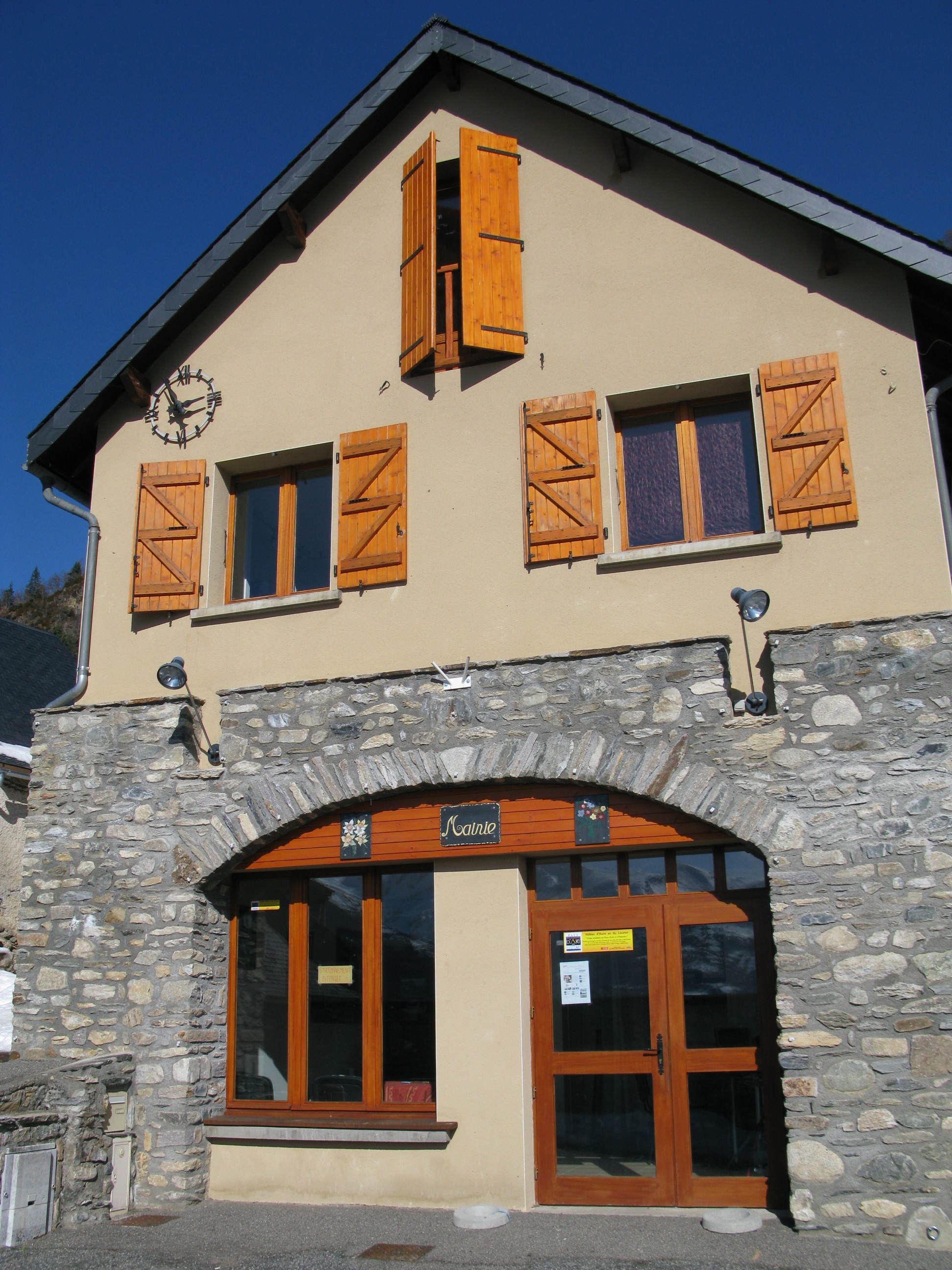 Grailhen - Mairie